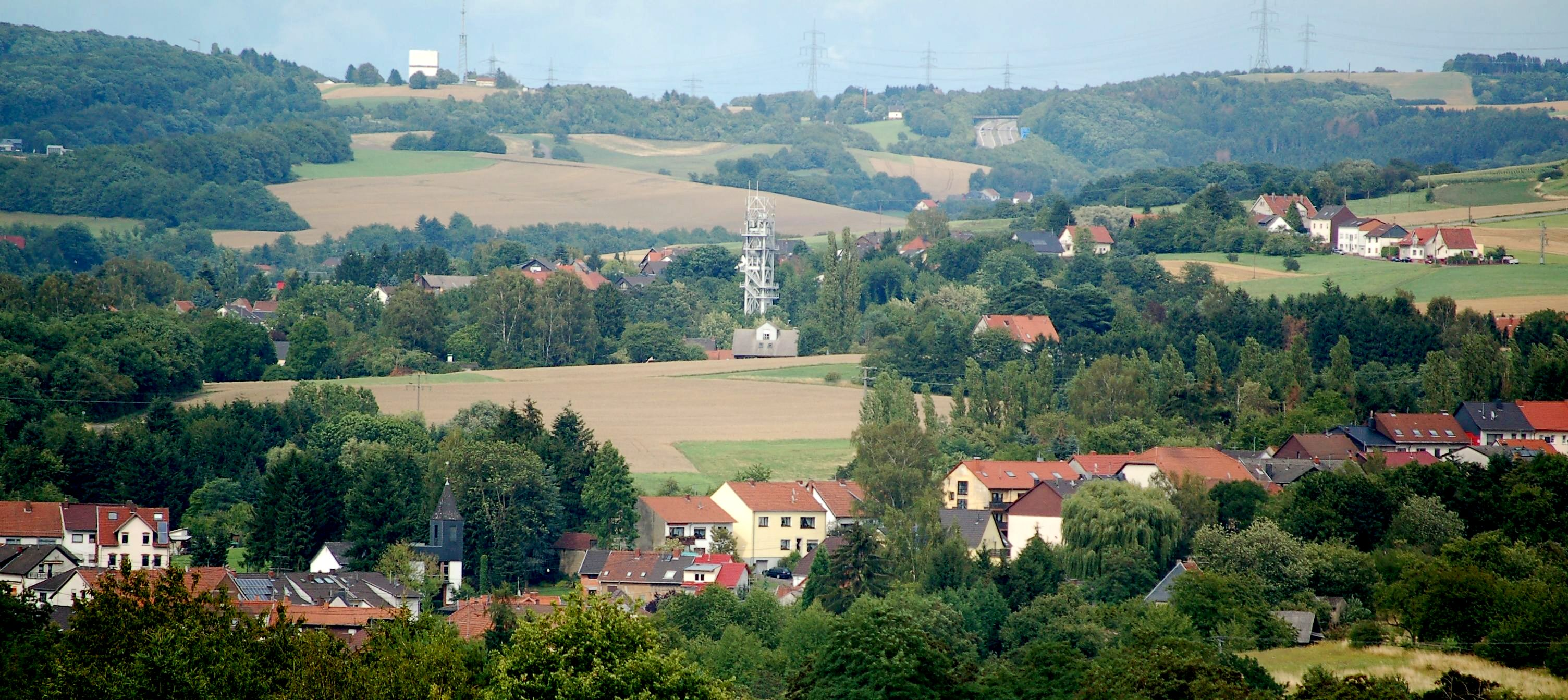 Blick vom Kyllberg in Herchenbach nach Osten über das mittlere Köllertal: im Vordergrund die Kurzenbergstraße in Walpershofen (links unten die ev.-luth. Kirche) – in der Bildmitte der Förderturm der ehemaligen Grube Dilsburg. – Im Hintergrund ist halbrechts oben die A8 zu sehen, die hier aus dem Köllertal zum Autobahnkreuz mit der A1 bei Göttelborn hinaufführt.